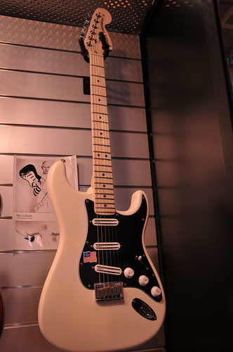 Fender Stratocaster Billy Corgan signature, Salon de la Musique et du Son 2008